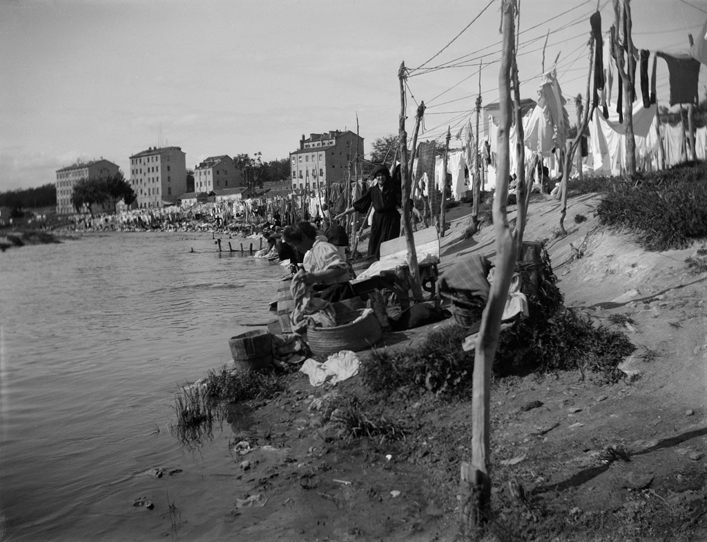 Antiguos lavaderos en la vega del río Manzanares de Madrid muy cerca de la ciudad. Las mujeres lavanderas lavaban allí la ropa y la devolvían limpia y planchada. Casas y antiguos lavaderos públicos que se encontraban entre los puentes de Segovia y Toledo. Y en las inmediaciones de la ermita de San Antonio. Y al cabo de la cuesta de San Vicente. Còpia moderna del negatiu original de vidre. 20 x 25 cm. Llegat Dolors Moros, 2010. Museu d'Art Jaume Morera. 2814